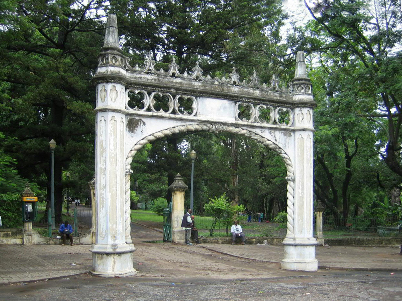 Maputo, Mozambique